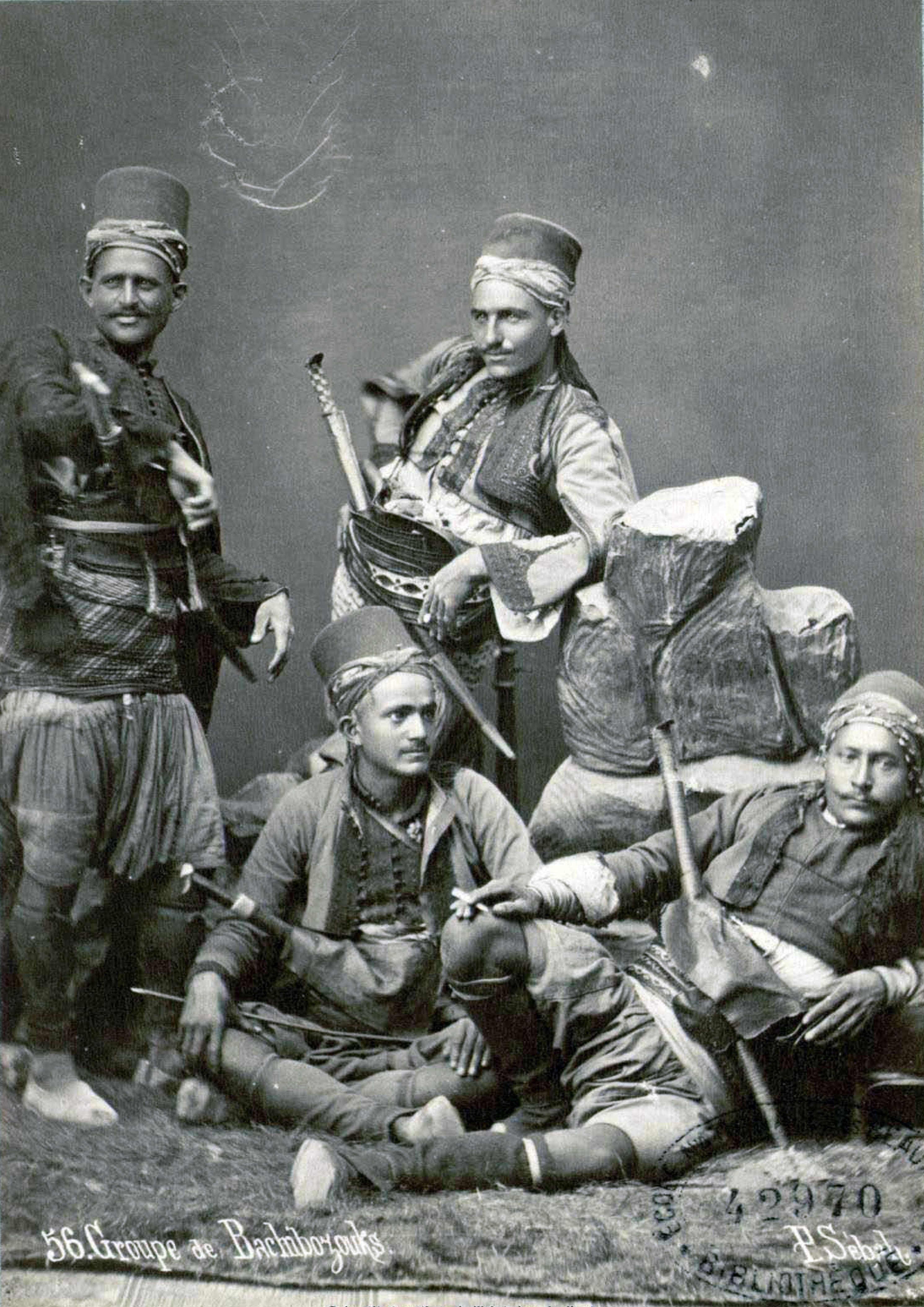 Epreuve sur papier albuminé. INHA NUM PH 8099.